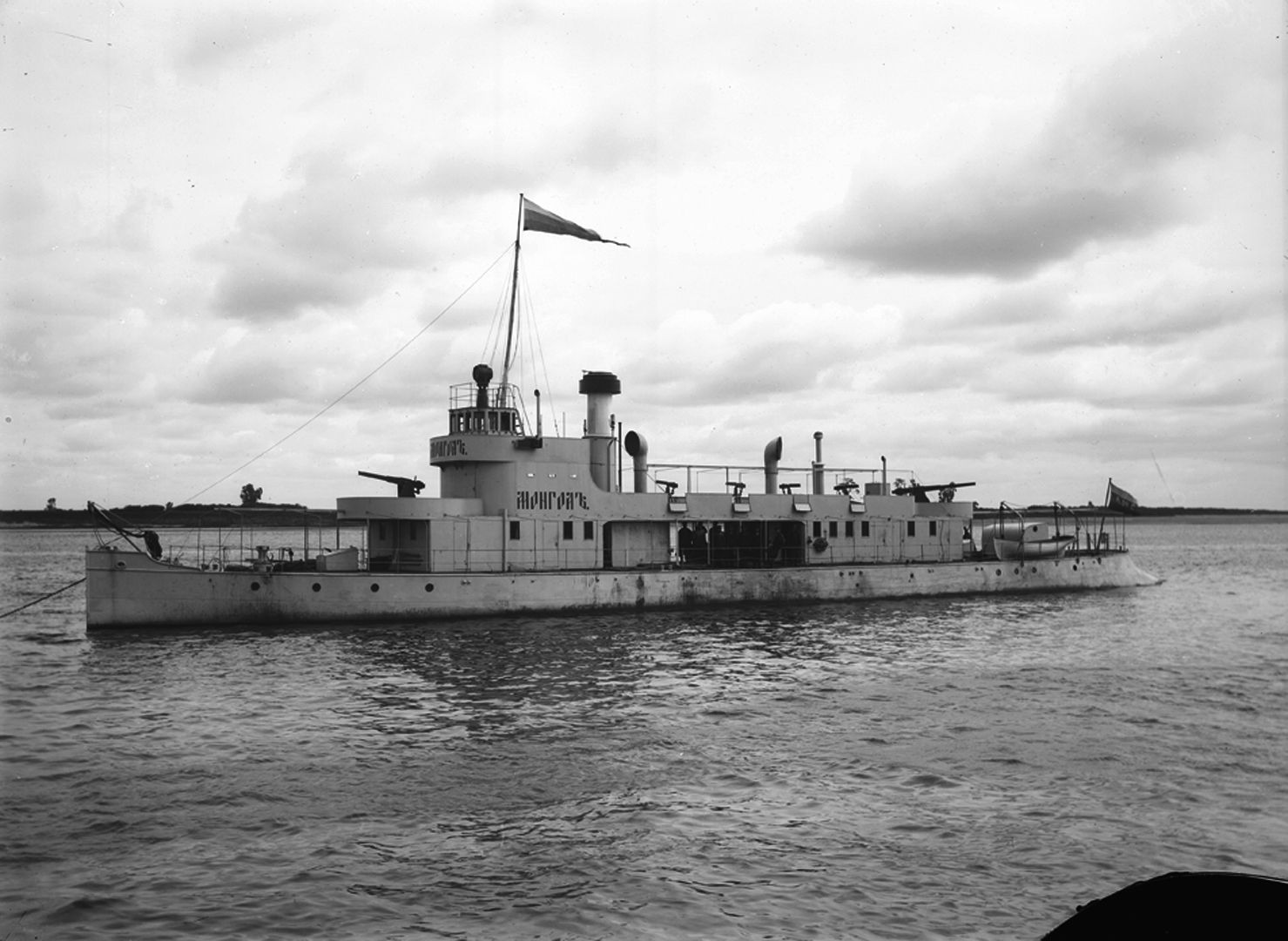 Канонерская лодка «Монгол» Амурской флотилии